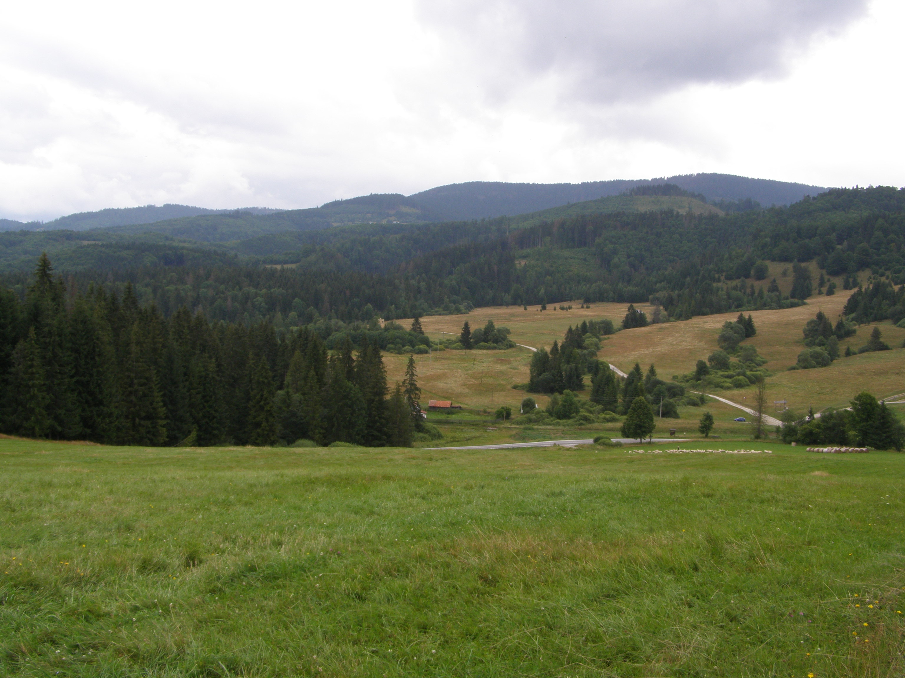 Slovenské rudohoří, Veporské vrchy, Fabova hoľa, sedlo Zbojská